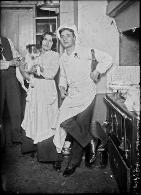 Le 11 mai 1912, le boxeur français Charles Ledoux se tient debout, bouteille à la main, à côté d'une femme portant un chien.